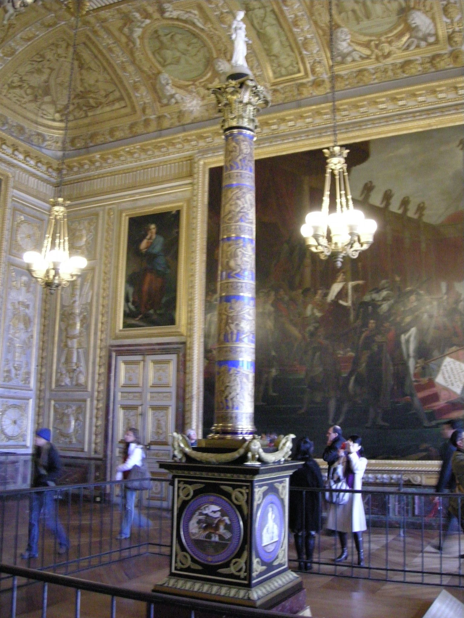 Versailles, colonna d'austerlitz della manifattura di sévres